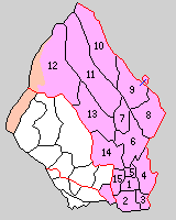 栃木県安蘇郡の町村。